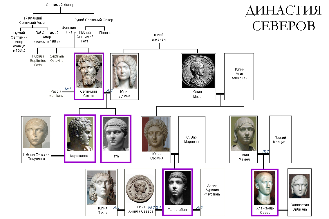 Родословное (генеалогическое) древо династии Северов (императоры Древнего Рима)